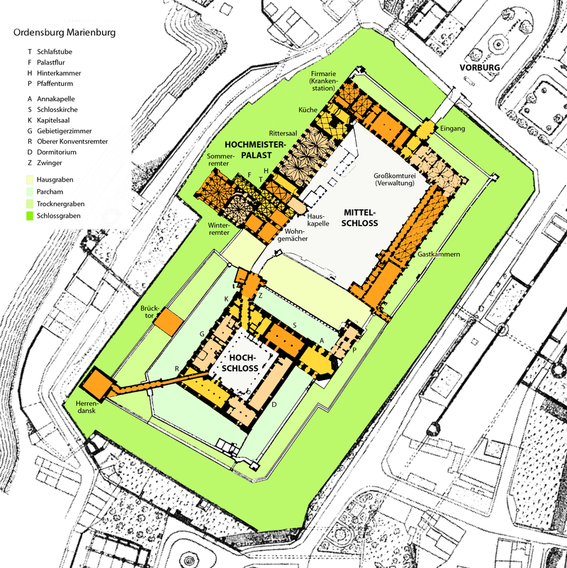 Plan der Ordensburg Marienburg in Malbork